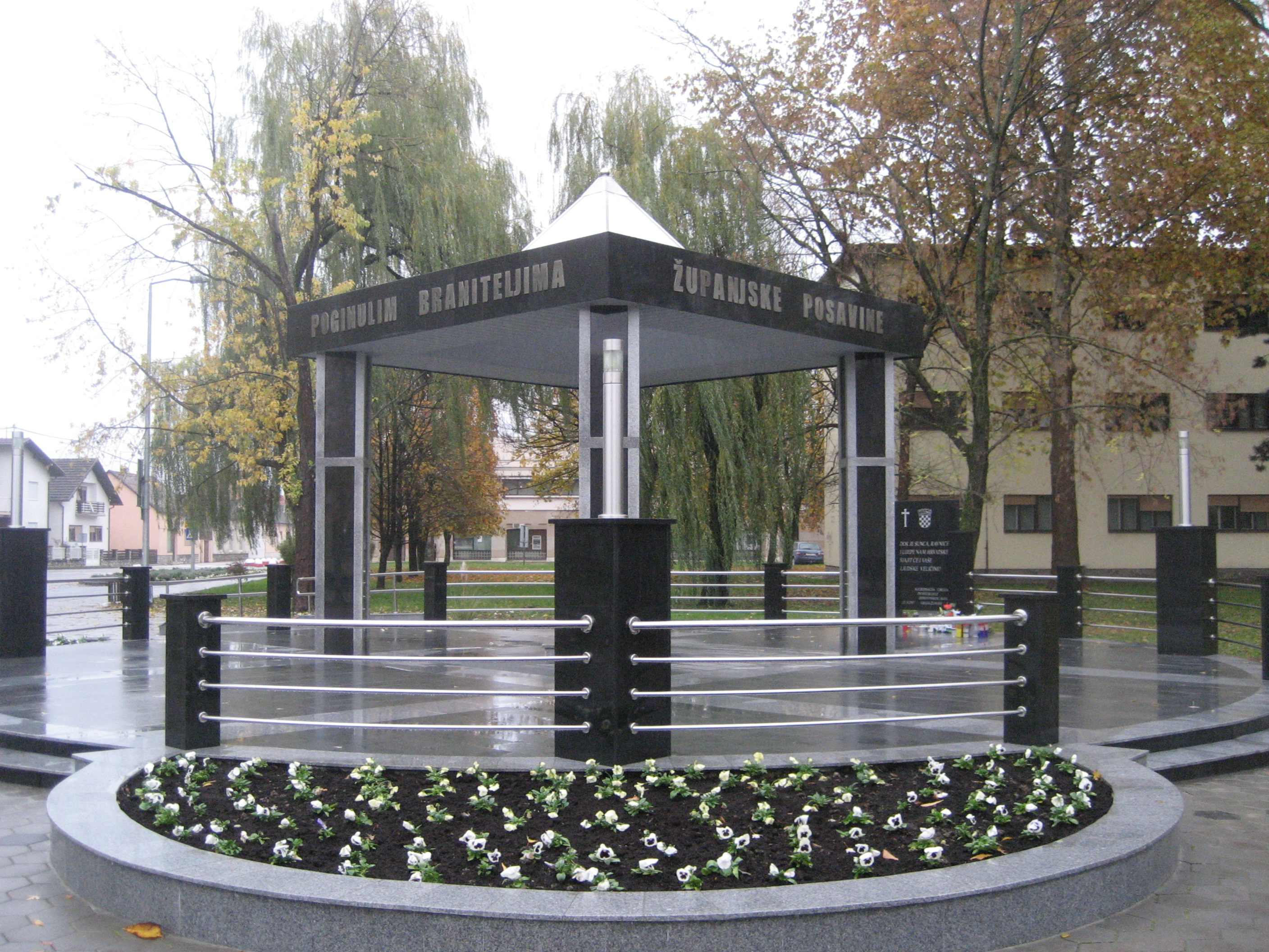 defender´s memorial in Zupanja, Croatia